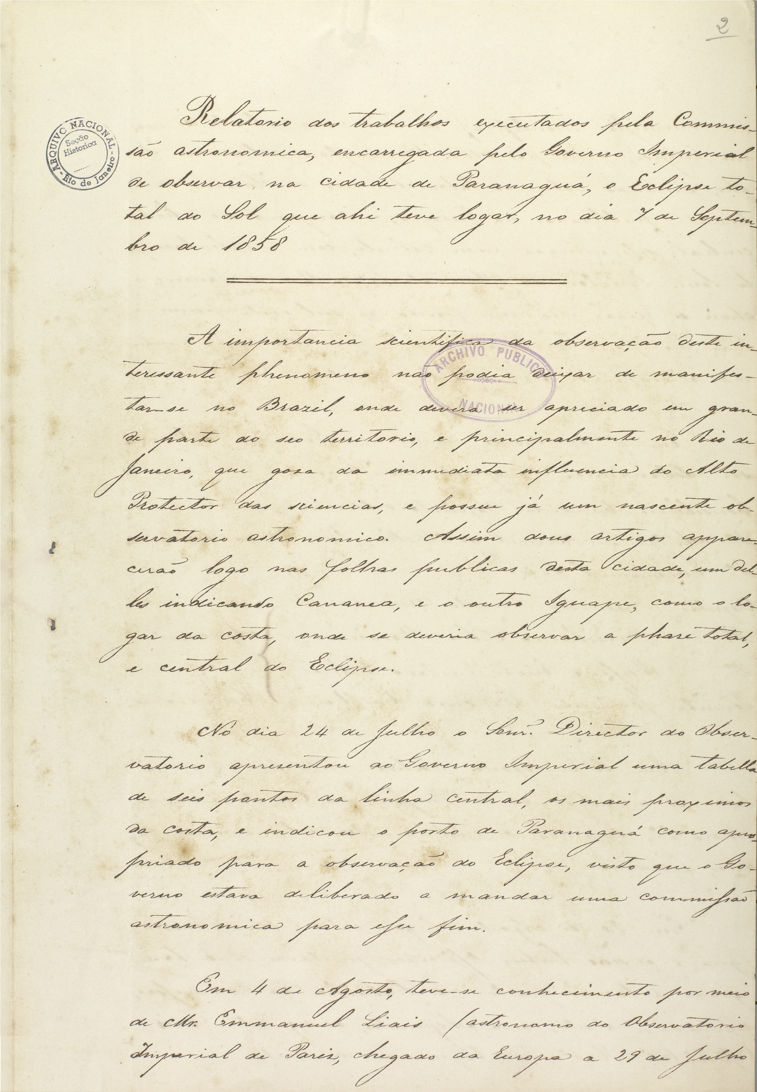 Série Educação - Observatório Astronômico (IE8).